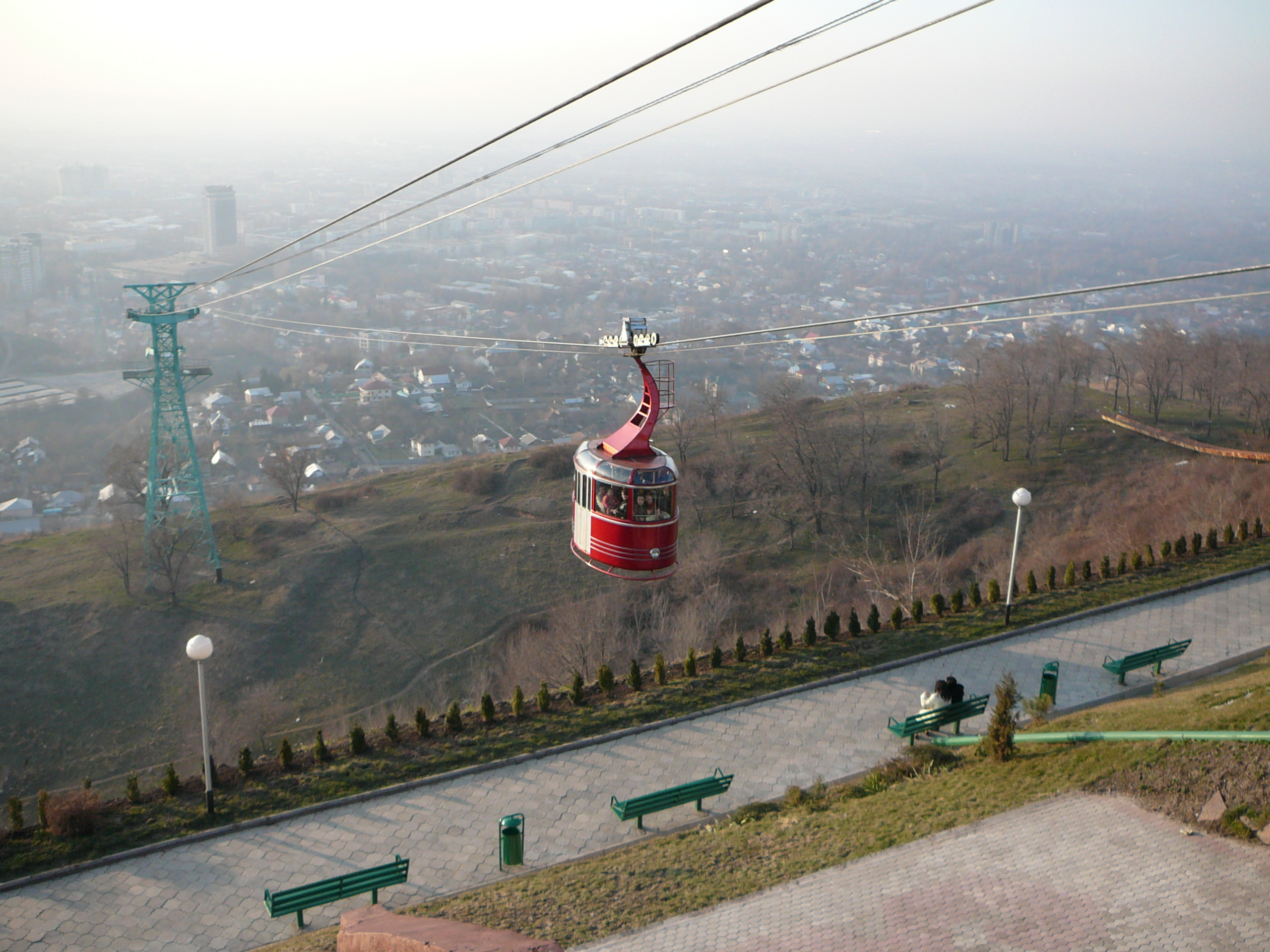 Вид на Алма-Ату от станции канатной дороги на Кок-Тобе